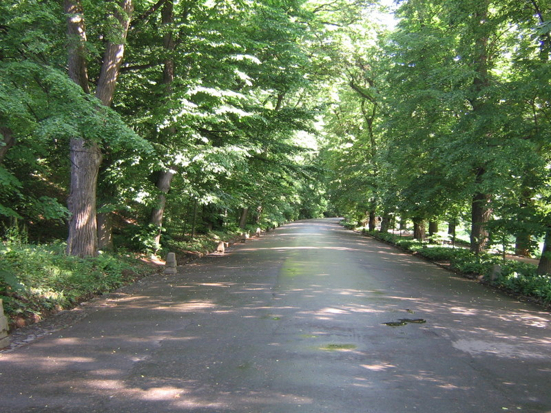 Центральная аллея.